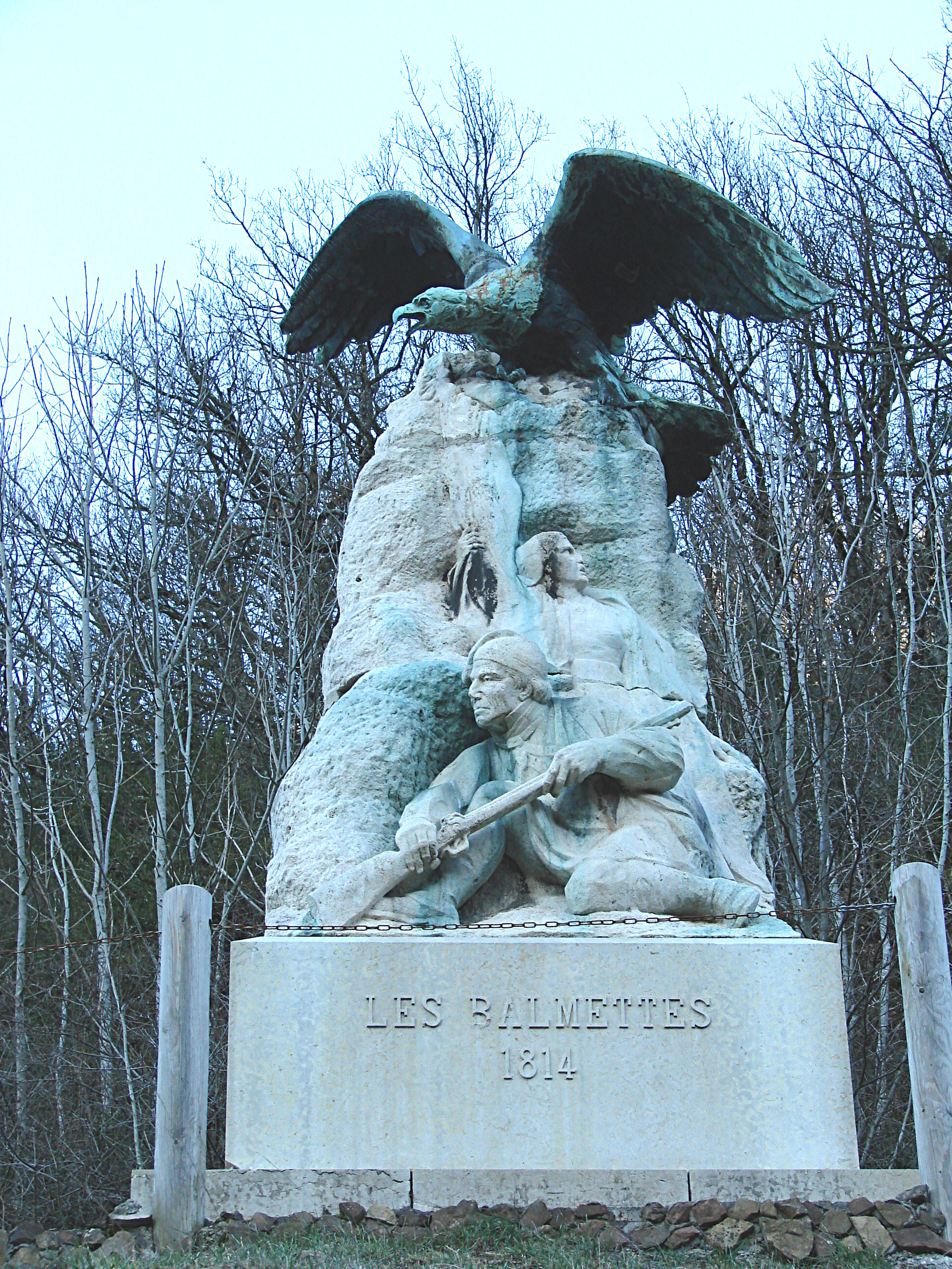 "l'Aigle des Balmettes", monument commémoratif du combat des Balmettes (mars 1814)